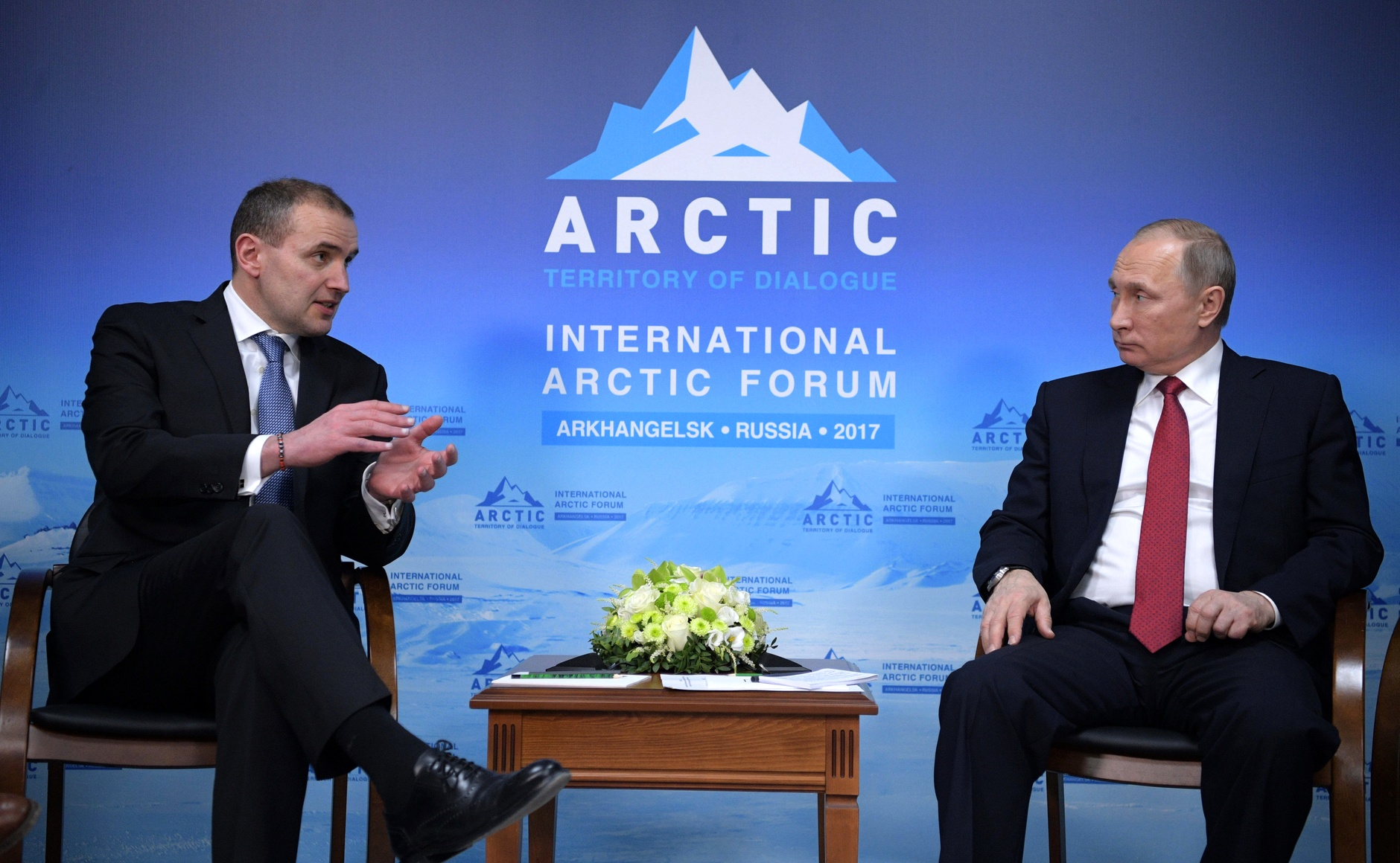 Встреча Президента России Владимира Путина с Президентом Исландии Гудни Йоханнессоном в рамках Международного арктического форума «Арктика – территория диалога».